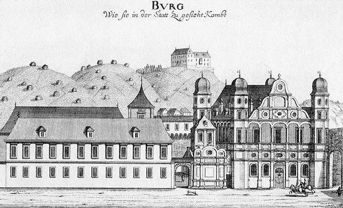 Stari in mestni grad Maribor v Vischerjevi topografiji leta 1686